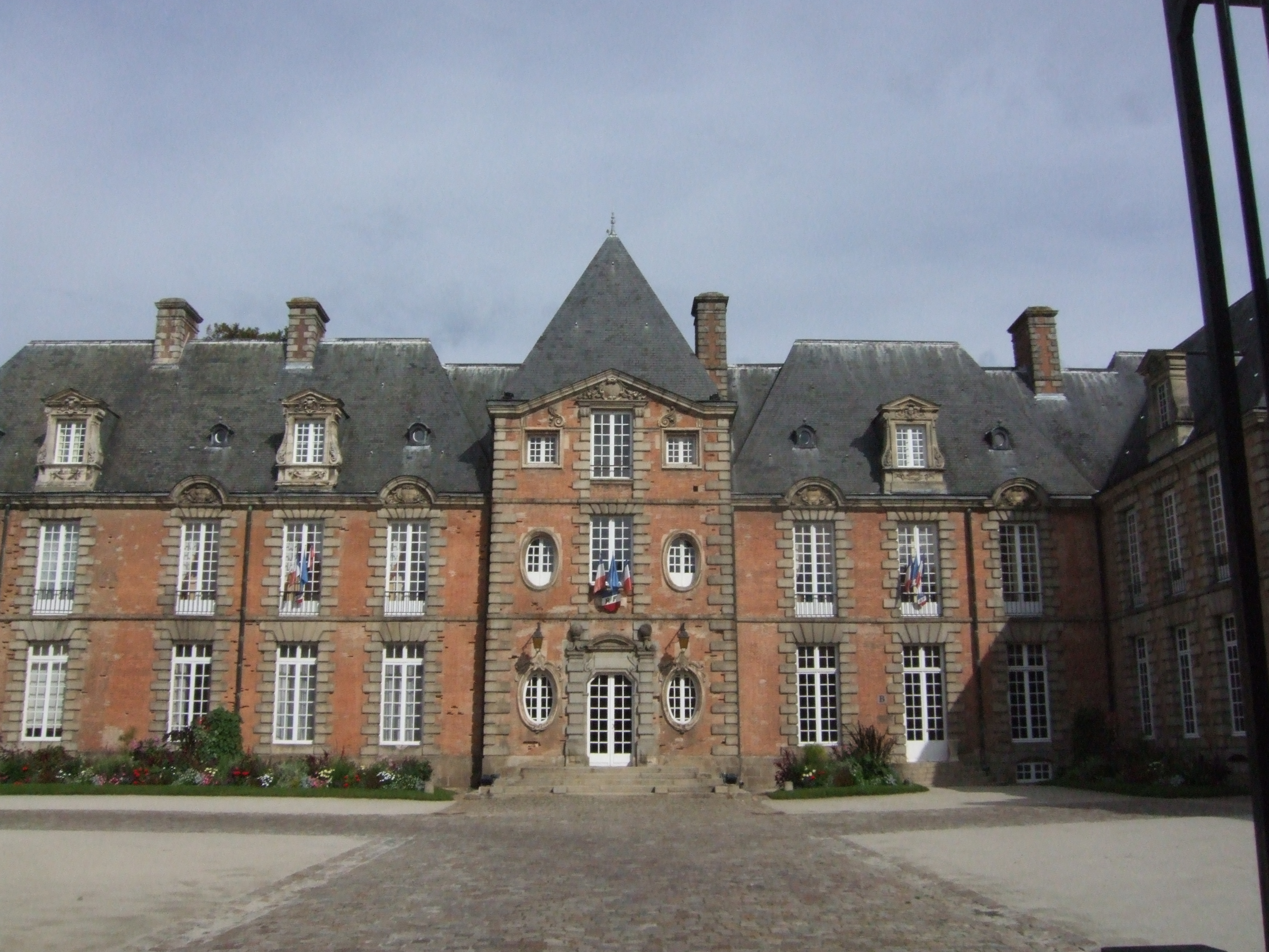 Hôtel de Guise, Préfecture de l'Orne à Alençon .